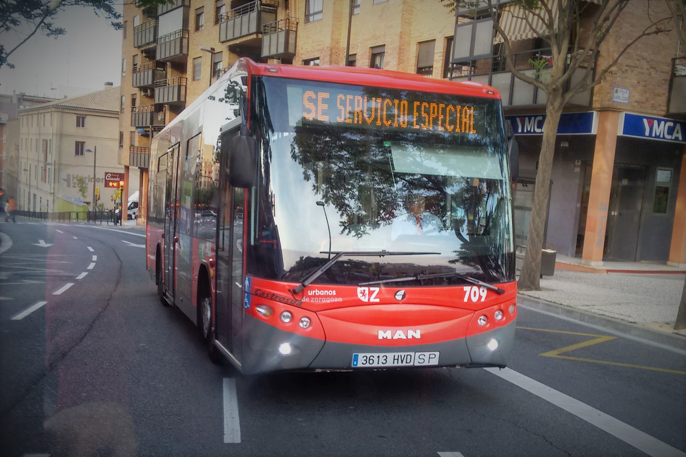 Autobús de Auzsa, prestando servicio especial.